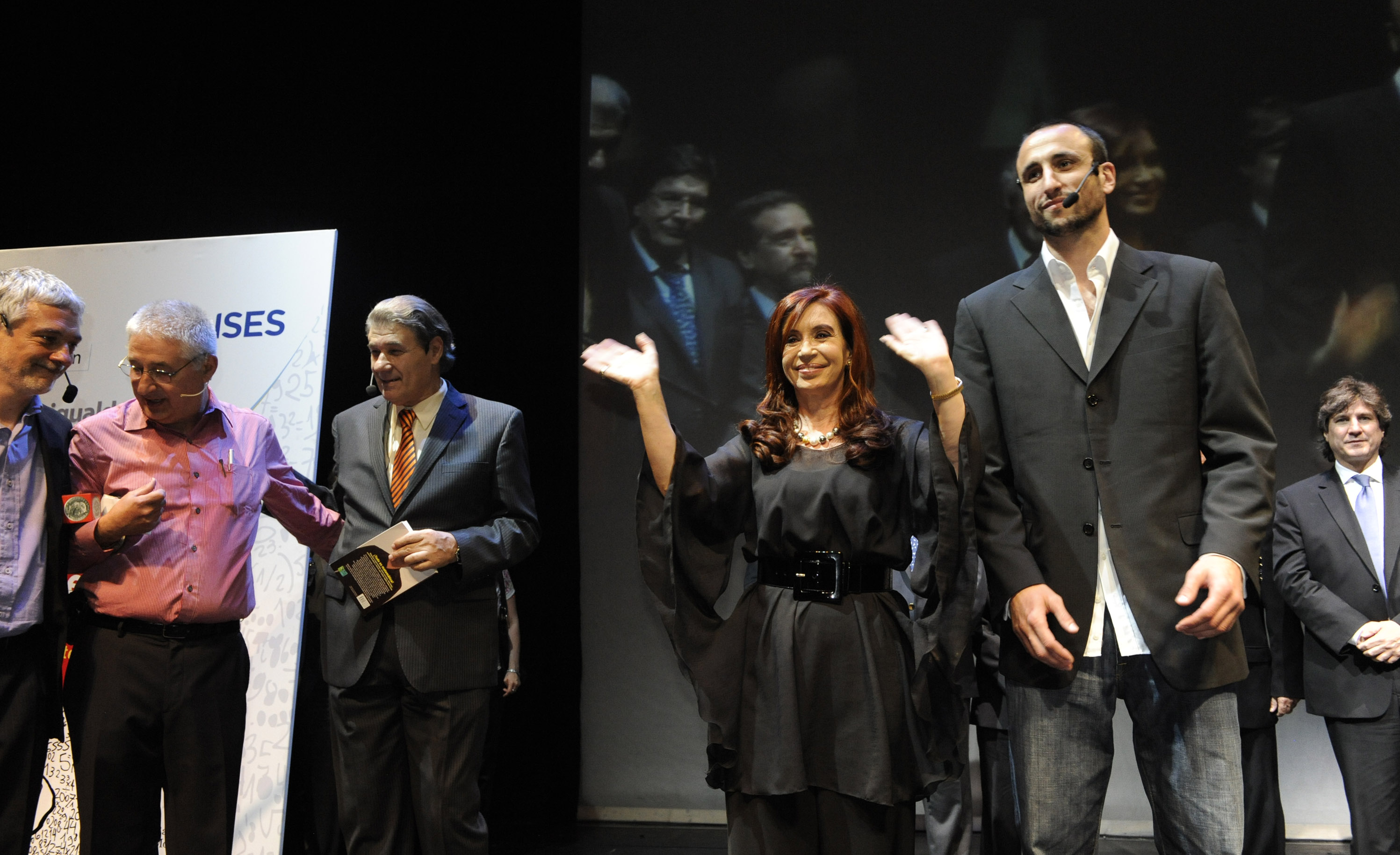 La presidenta Cristina Fernández saluda durante el acto de presentación del nuevo libro de Adrián Paenza: ¿Cómo, esto también es matemática?", en el Teatro Maipo. La acompañan el autor del libro, el periodista Víctor Hugo Morales y el basquetbolista Emanuel Ginóbili.